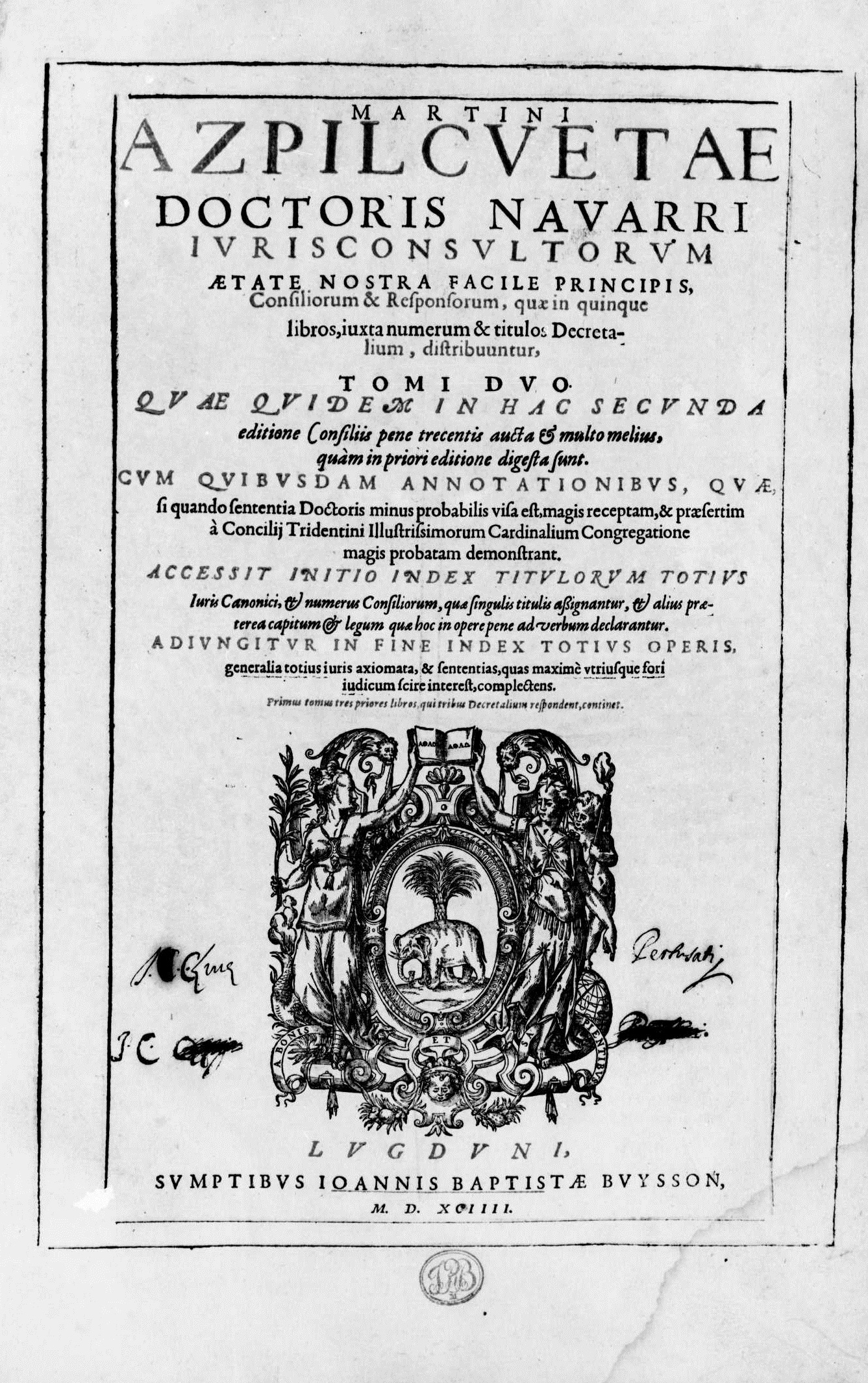 Frontespizio